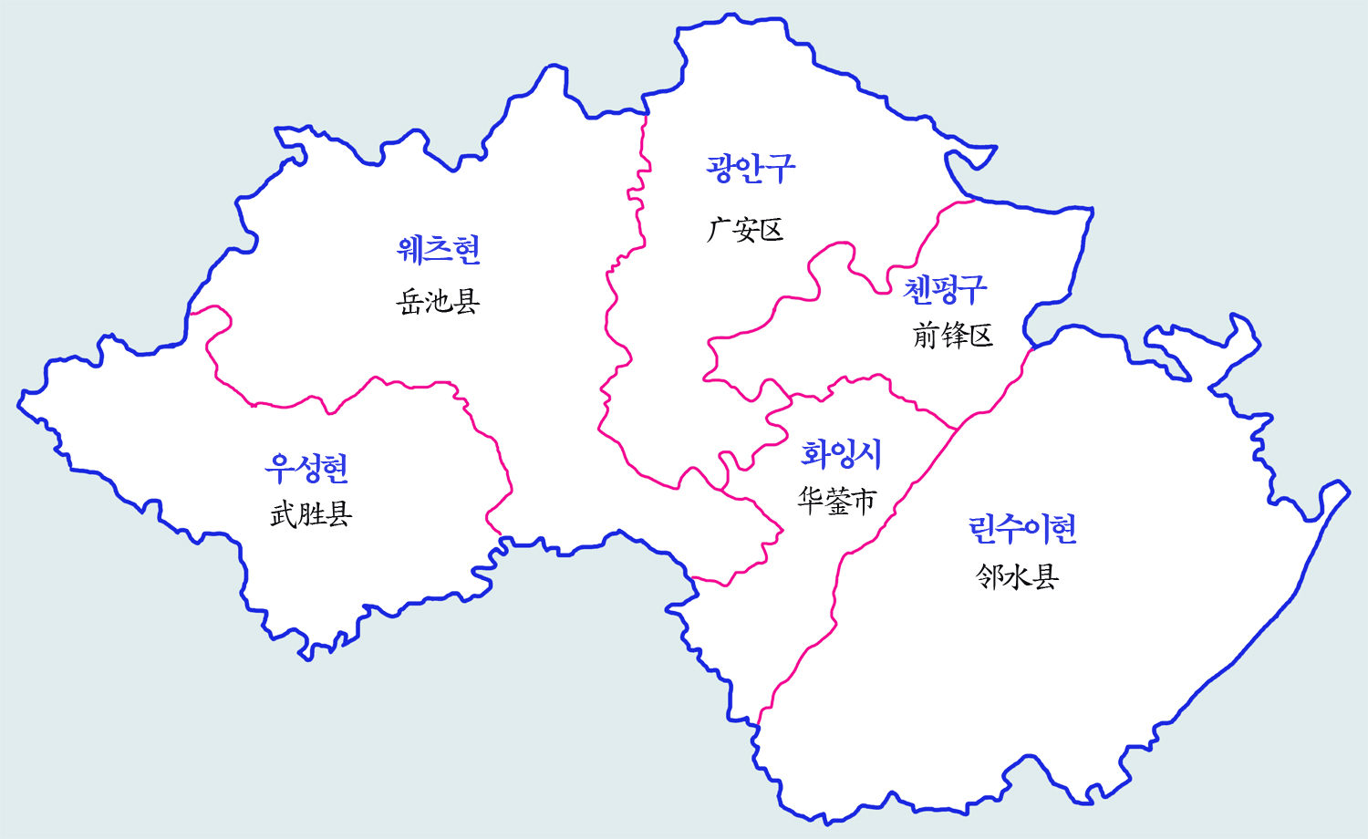 광안시 현급행정구역